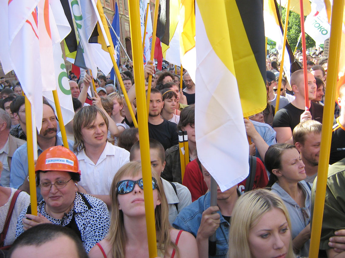 Марш Несогласных 09 июня 2007 года в Санкт-Петербурге